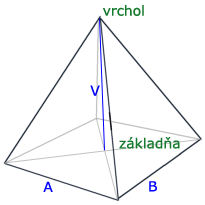 Pyramid / Ihlan (SK text)